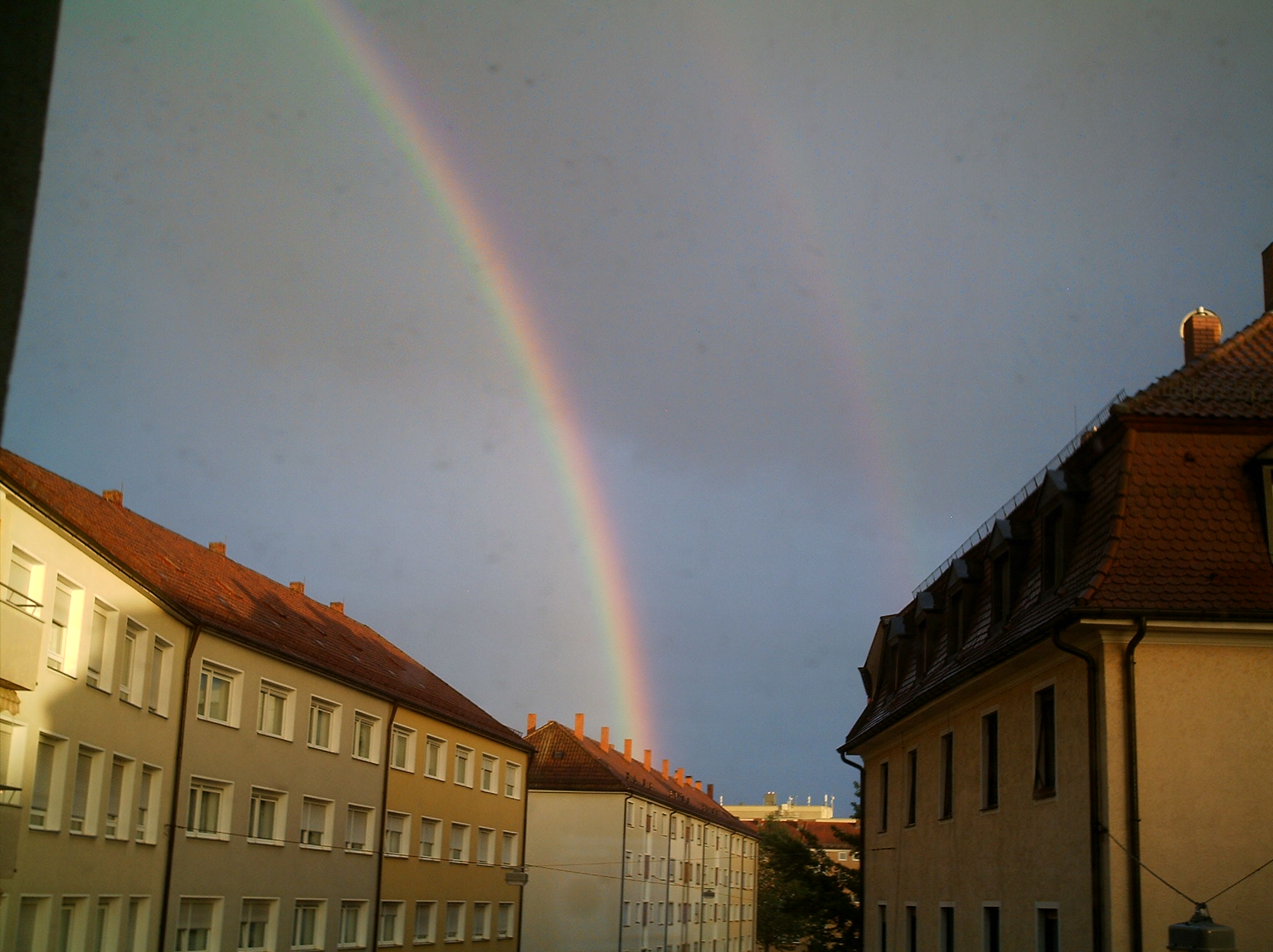 中文（中国大陆）: 雨后纽伦堡天空的双重彩虹